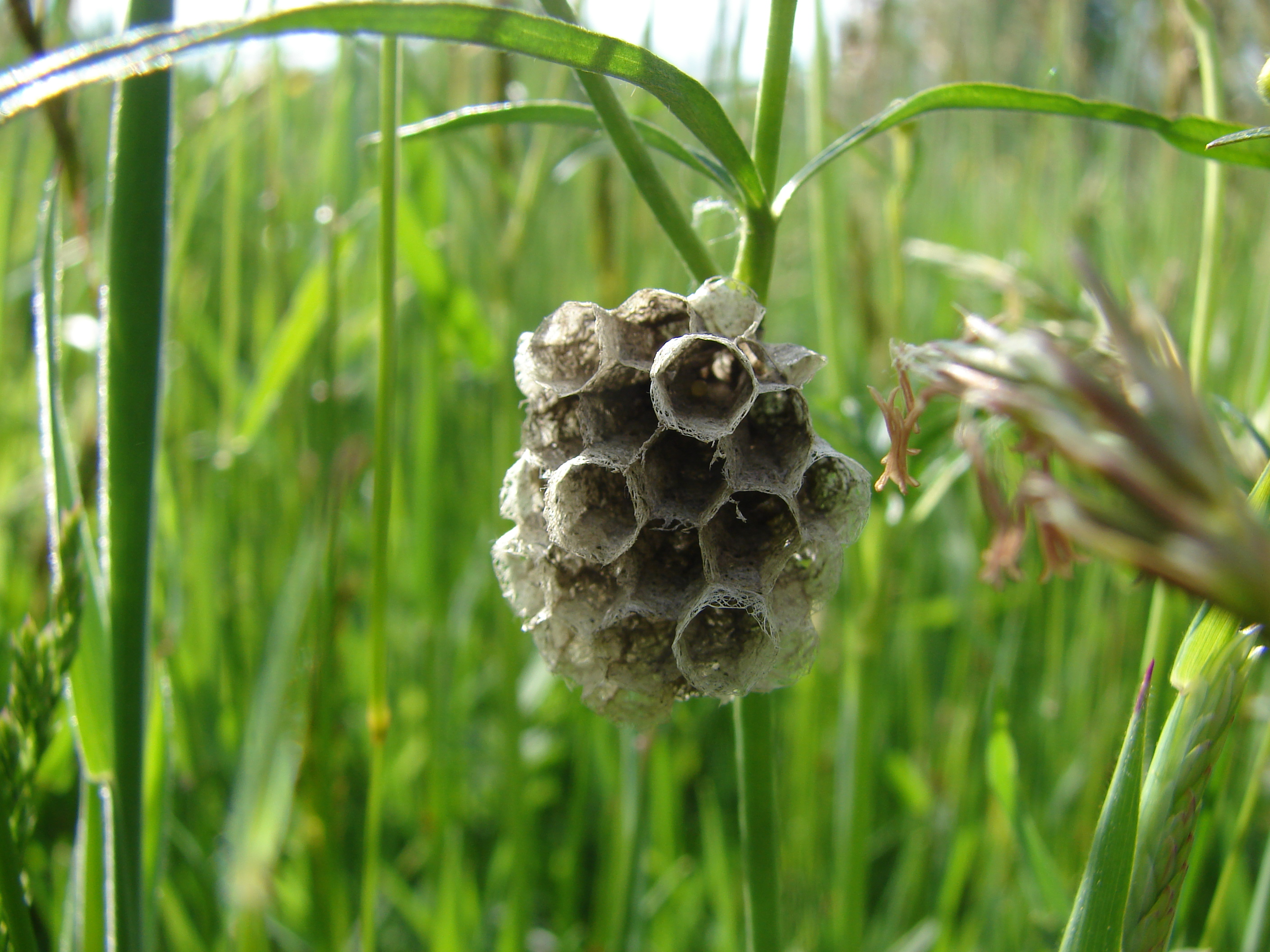 Maj. Góra Hugona.